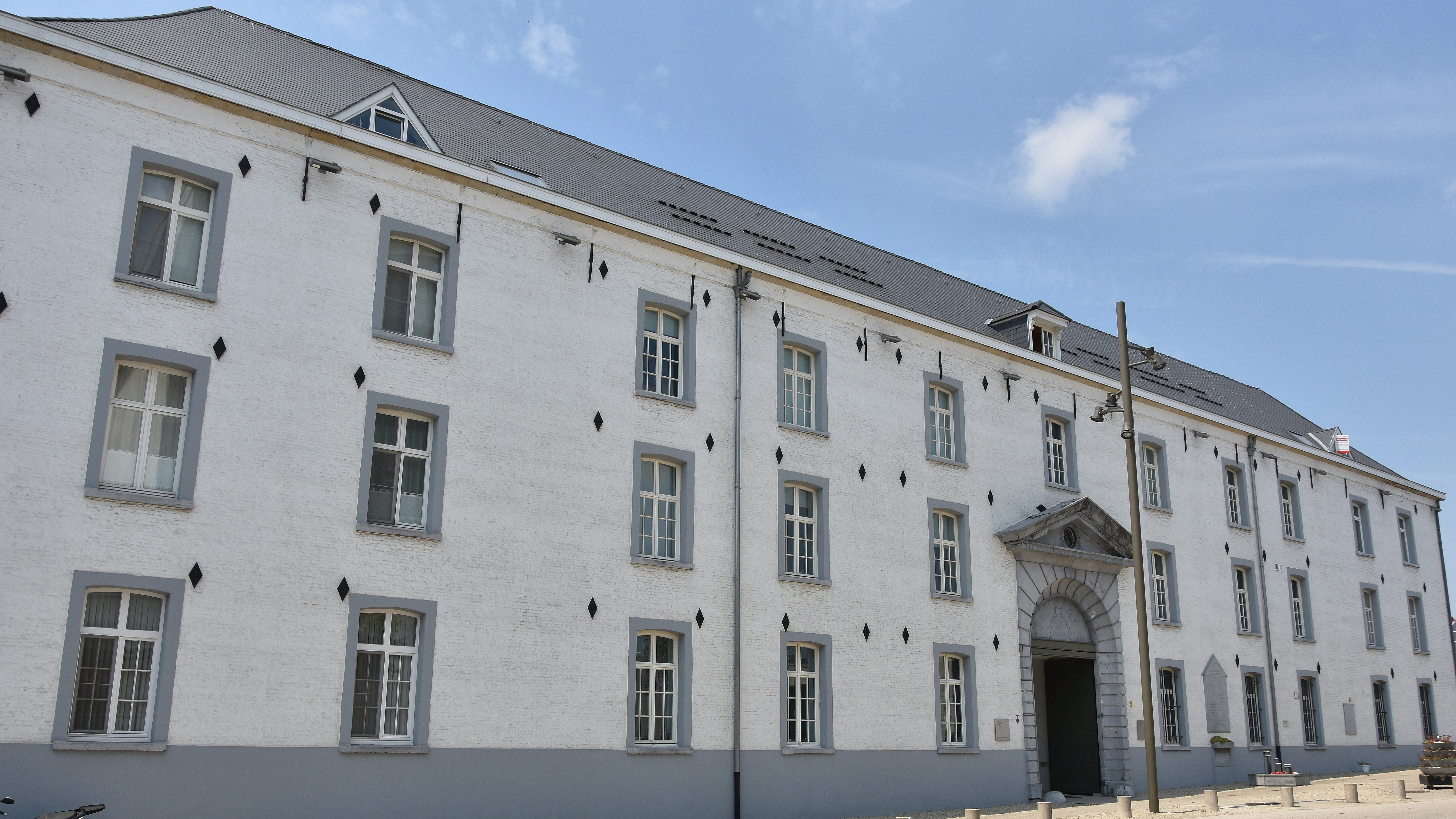 Kazerne Dossin - Mechelen This photo of immovable heritage has been taken in the Flemish Region